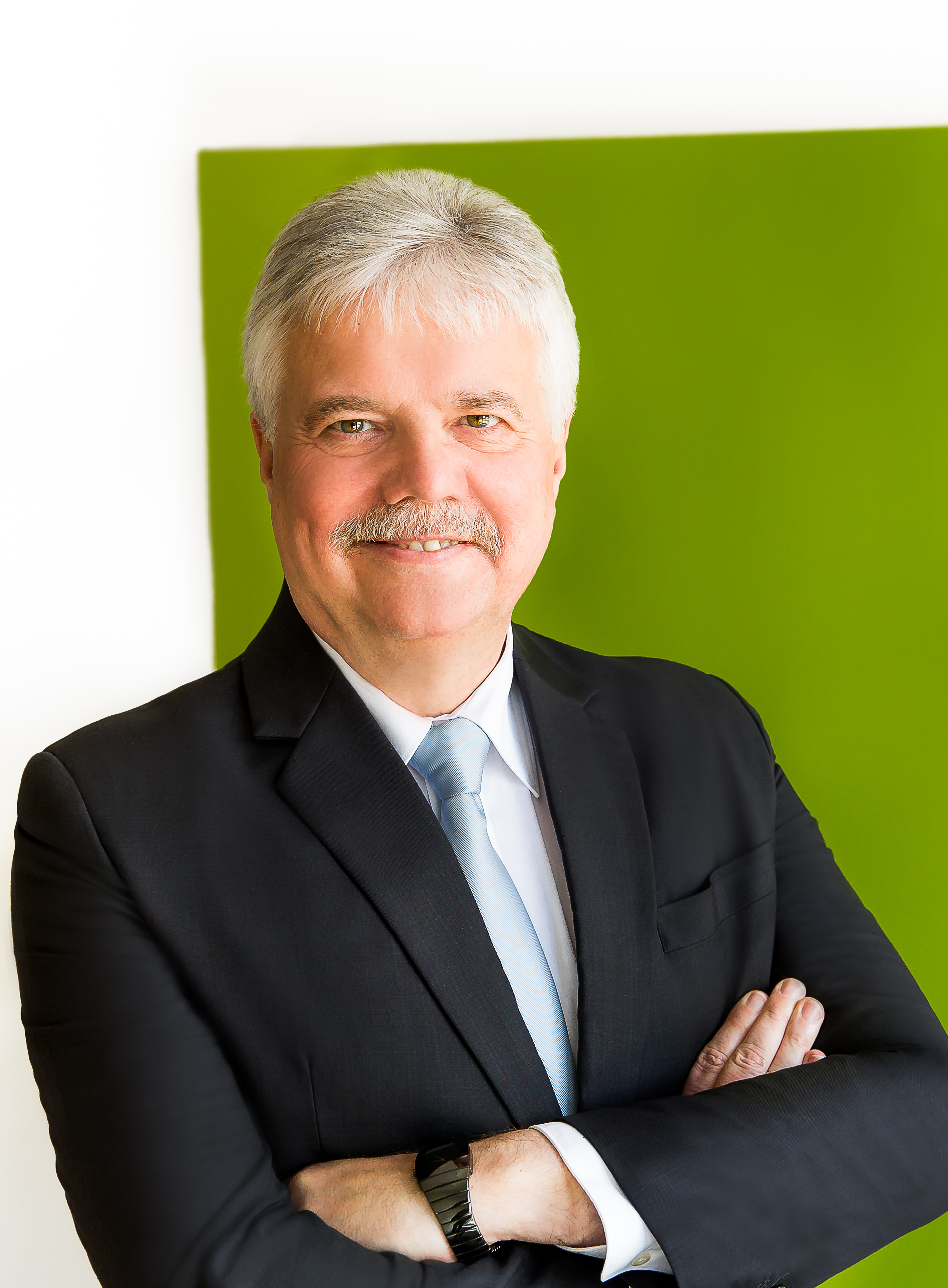 Andreas Mattner